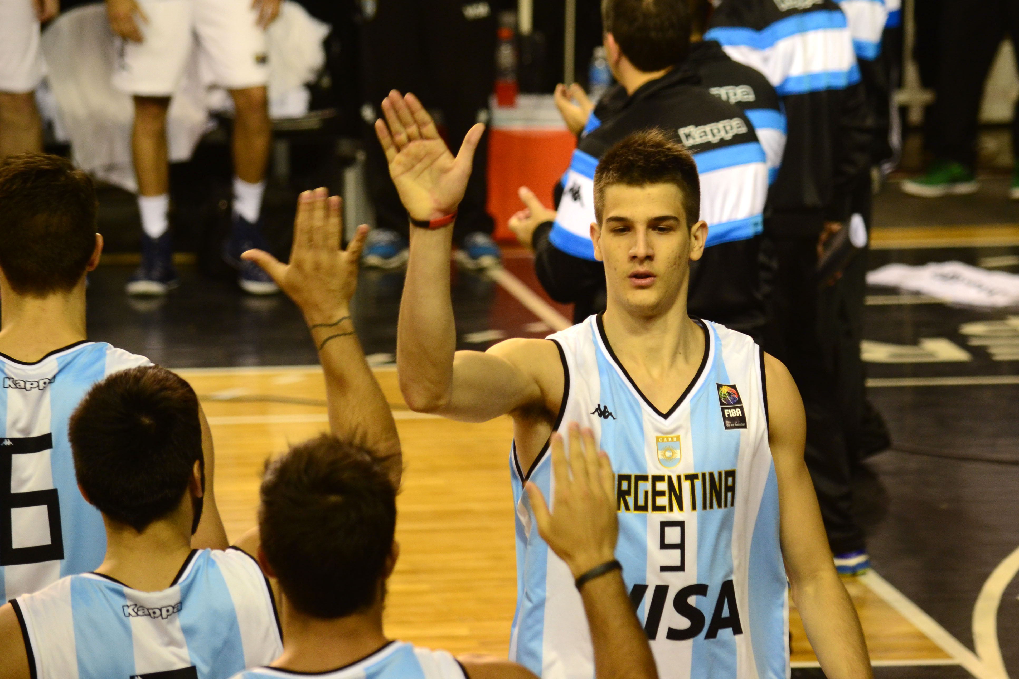 Nicolás Brussino